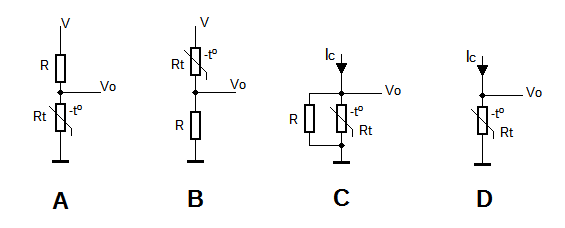 Varios circuitos sencillos de linealizacon de un termistor NTC.